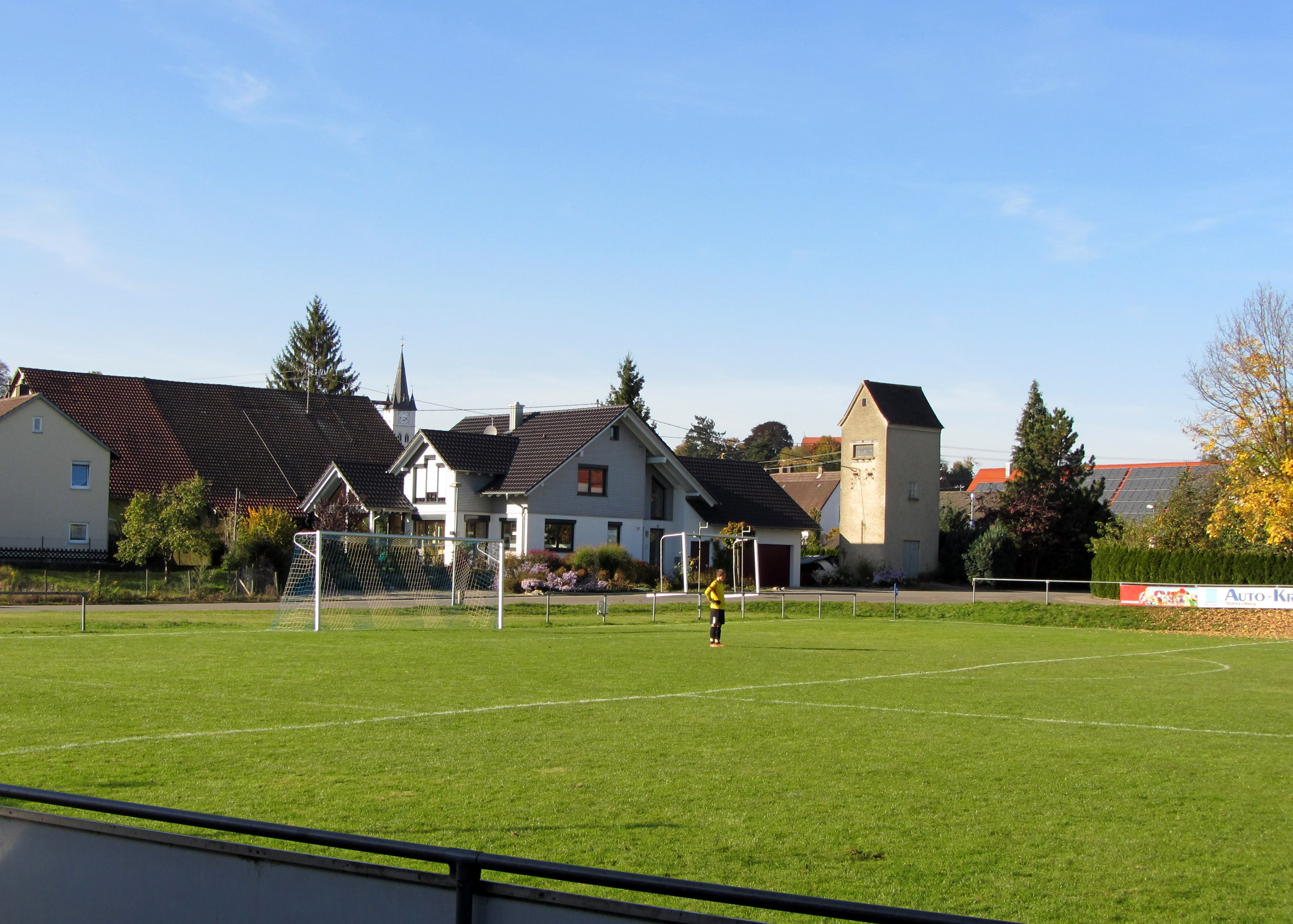 Sportplatz (Erolzheim)